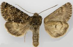 Lasionycta sasquatch male